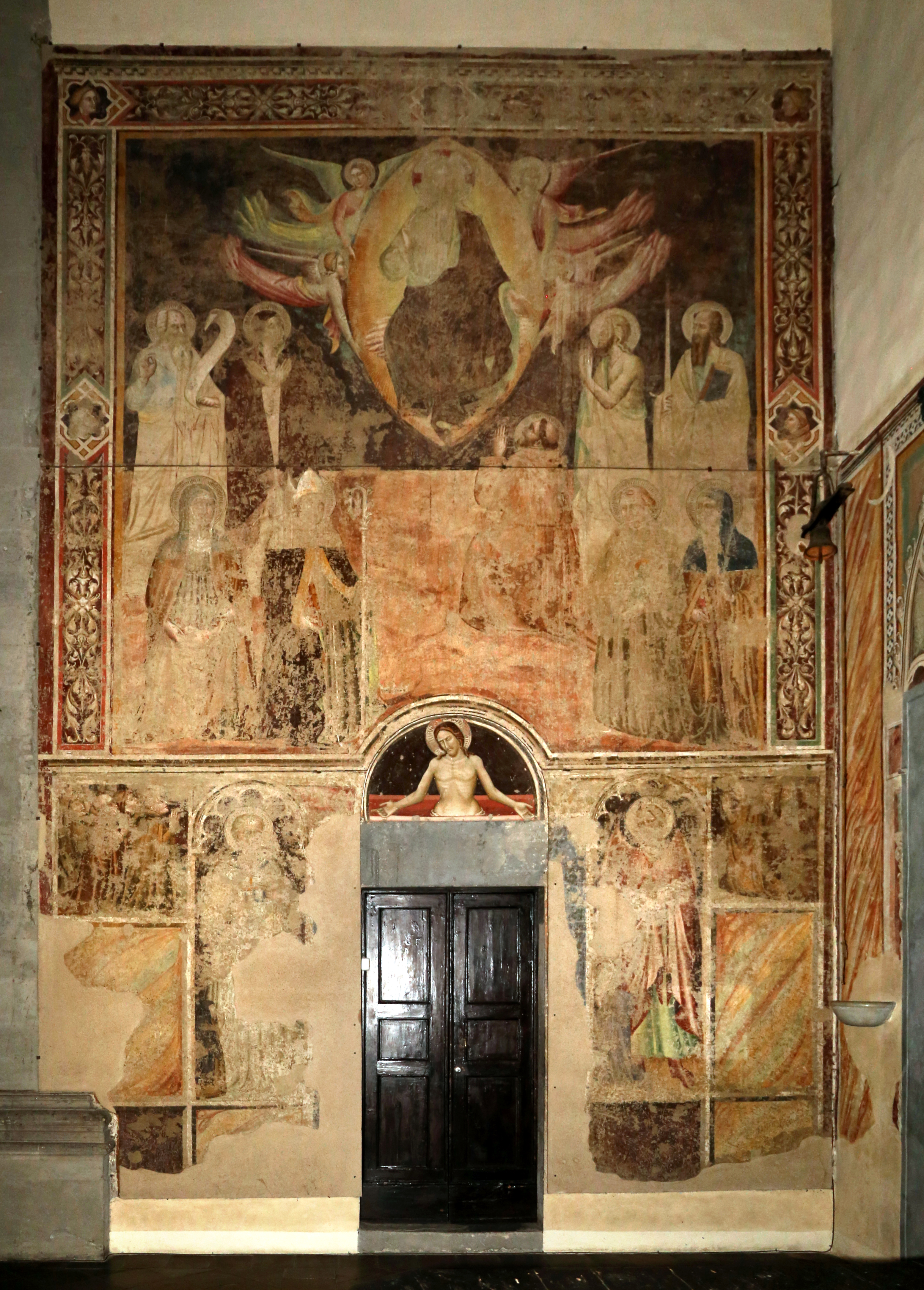 chiesa di San Francesco This is a photo of a monument which is part of cultural heritage of Italy.